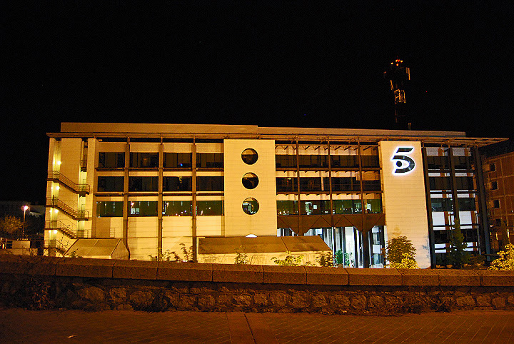 Fotografía tomada en la noche del 1 de julio de 2012, en las inmediaciones del edificio de Mediaset. En la imagen, la fachada principal de los estudios de Telecinco en Fuencarral, Madrid.